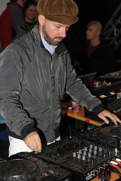 Stefan Hantel („Shantel“) auf dem Donauinselfest, Wien. September 2008.